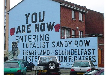 loyalist sandy row mural